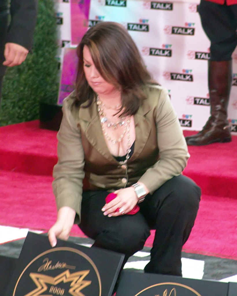 Jann Arden